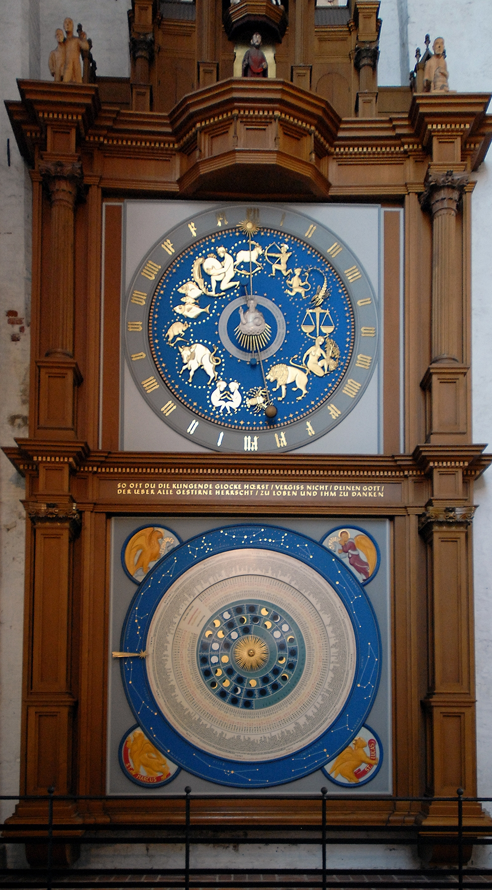 Astronomische Uhr der Kirche St. Marien, Lübeck. Detailansicht